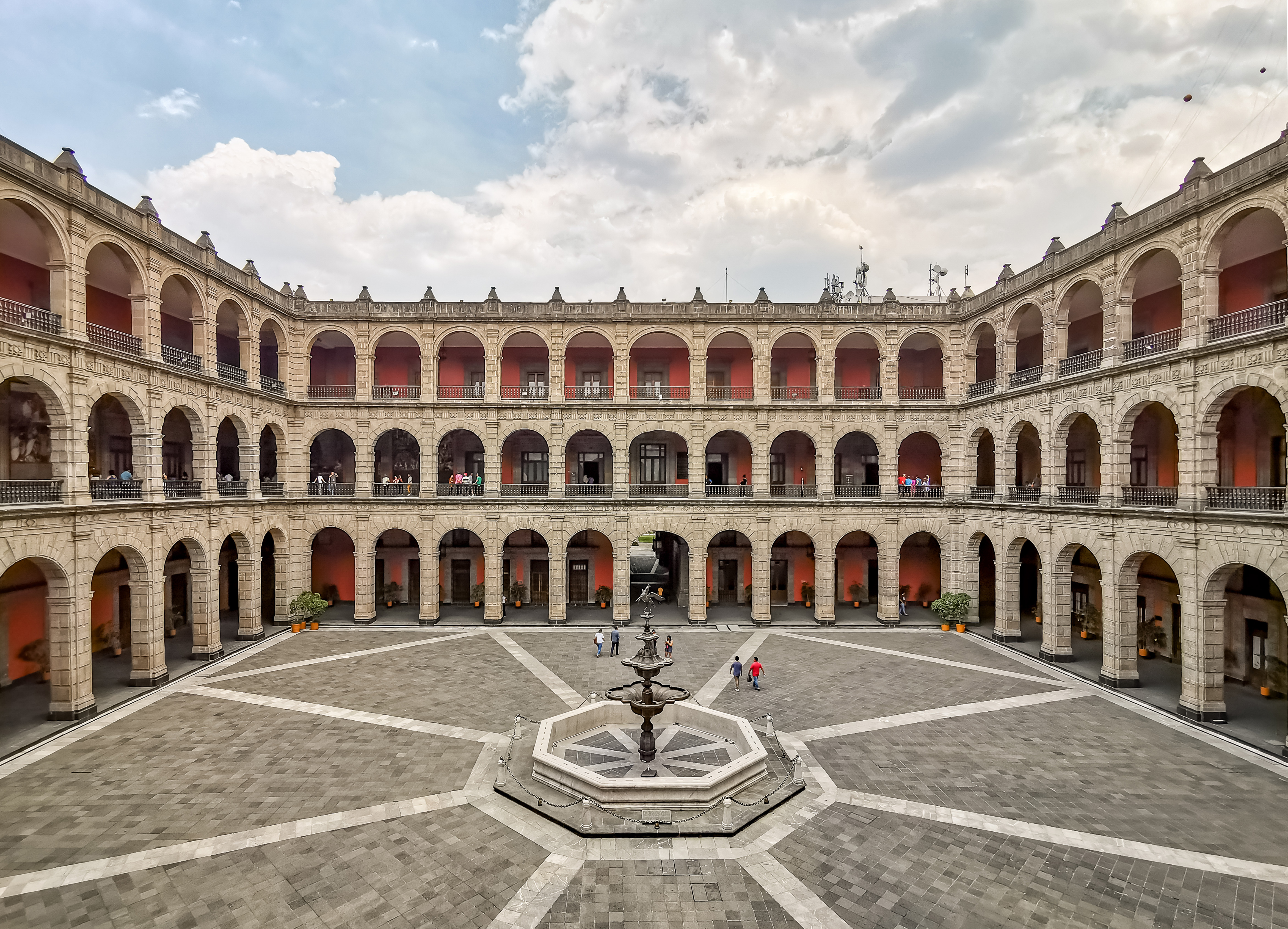 Patio Central en Palacio Nacional CDMX